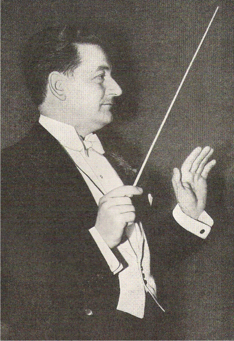 Fotografi af komponisten og dirigenten Johan Hye-Knudsen (24. maj i Nyborg 1896 - 28. september 1975)